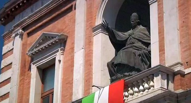 Statua di Papa Pio VI a Cesena